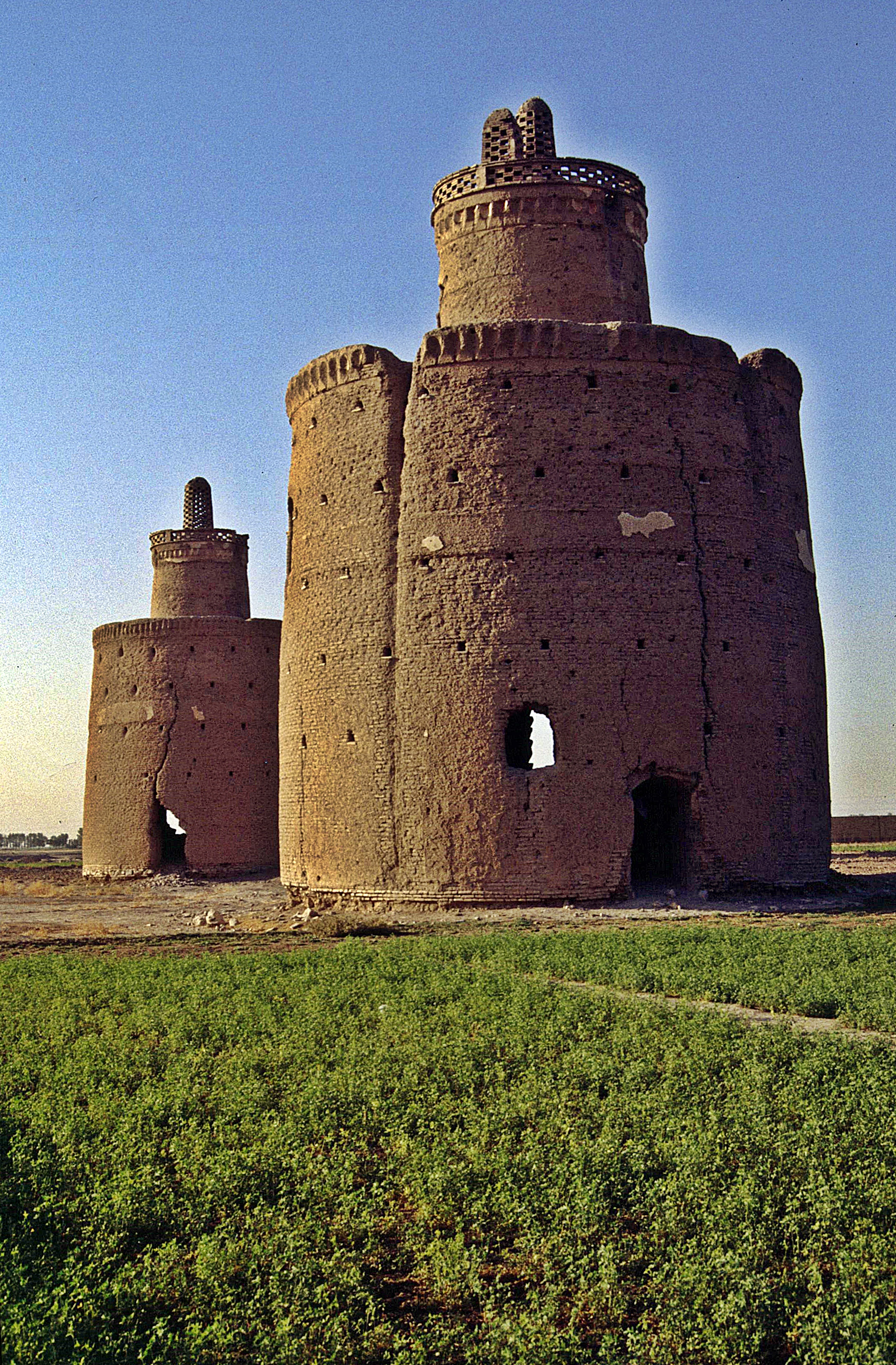 Taubenhäuser östlich von Isfahan